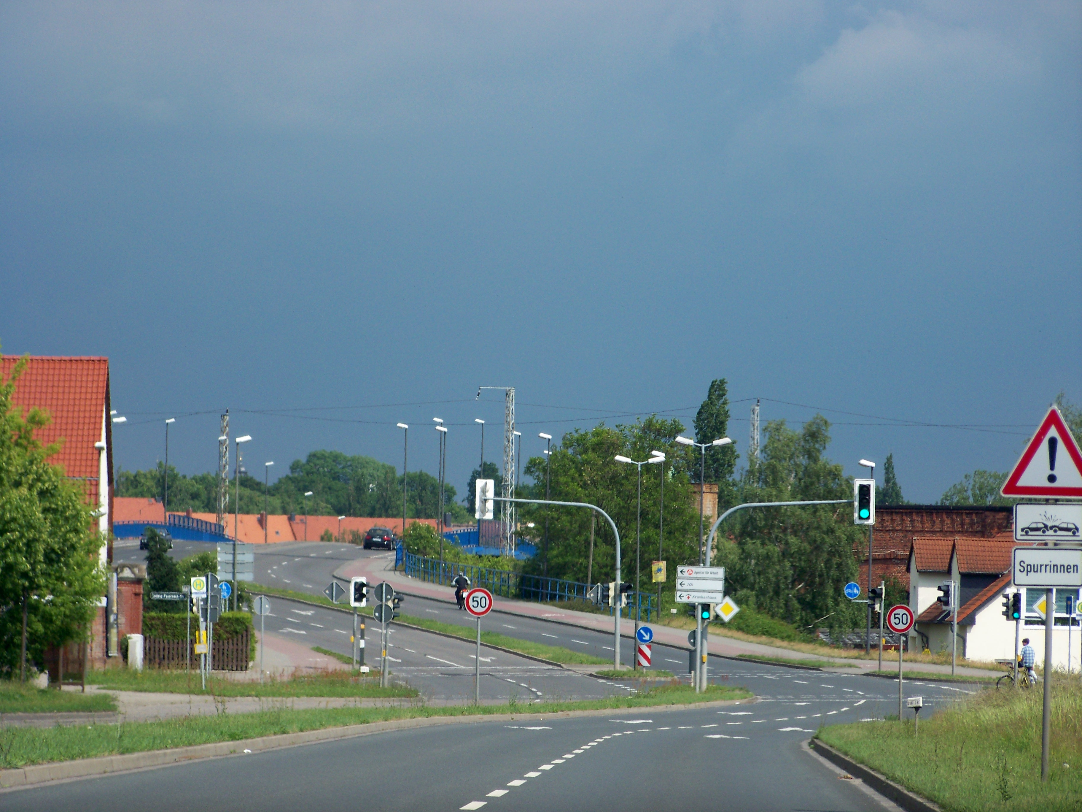 Warschauer Straße in Torgau